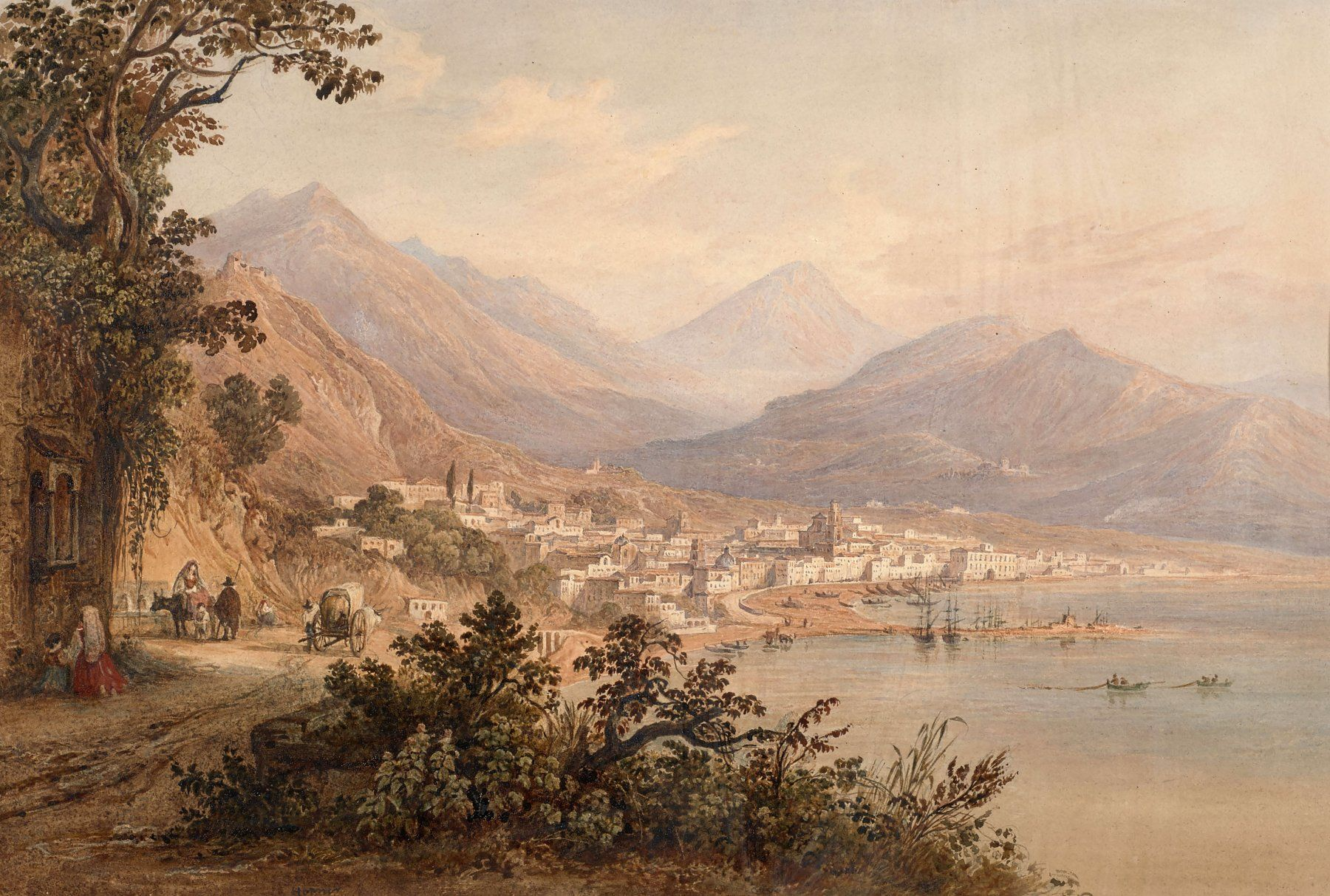 Vue de Salerne en Italie Aquarelle et gomme arabique, partiellement vernissé, signé 'Horner' en bas vers la gauche Hauteur : 27 cm Largeur : 40 cm